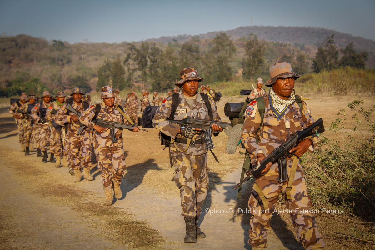 Osttimoresische Grenzpolizei (Unidade da Polícia de Fronteiras UPF)